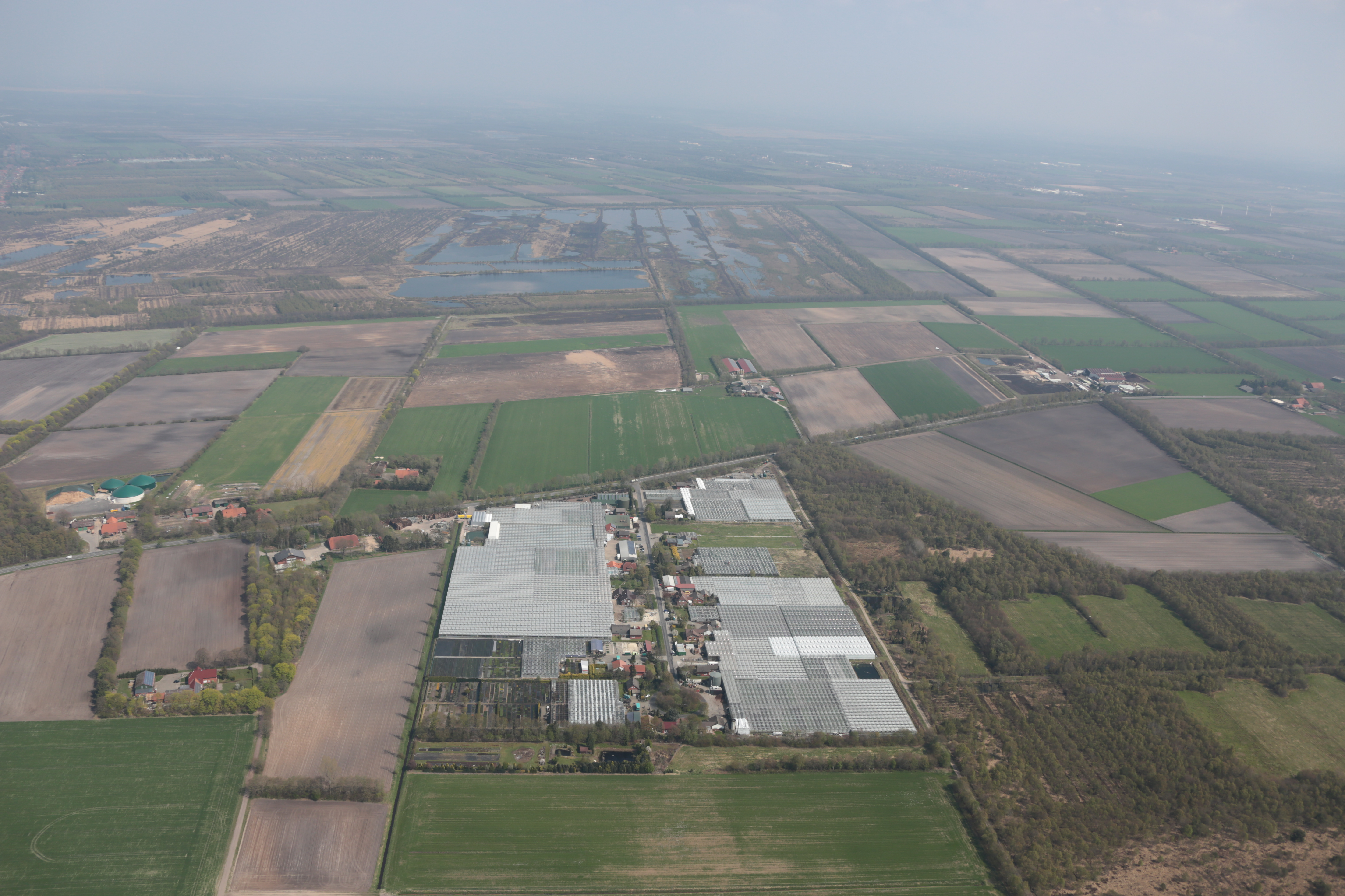 Fotoflug von Nordholz-Spieka nach Oldenburg und Papenburg: Blick nach Osten zum Naturschutzgebiet „Aschendorfer Obermoor/Wildes Moor“ in Papenburg This photo was taken by Alchemist-hp. If you use one of my photos, an email (account needed) or a message or direct to: my email account would be greatly appreciated. Please note the license terms. Other licensing terms can get discussed, too. This file is copyrighted and has been released under a license which is incompatible with Facebook's licensing terms. It is not permitted to upload this file to Facebook.